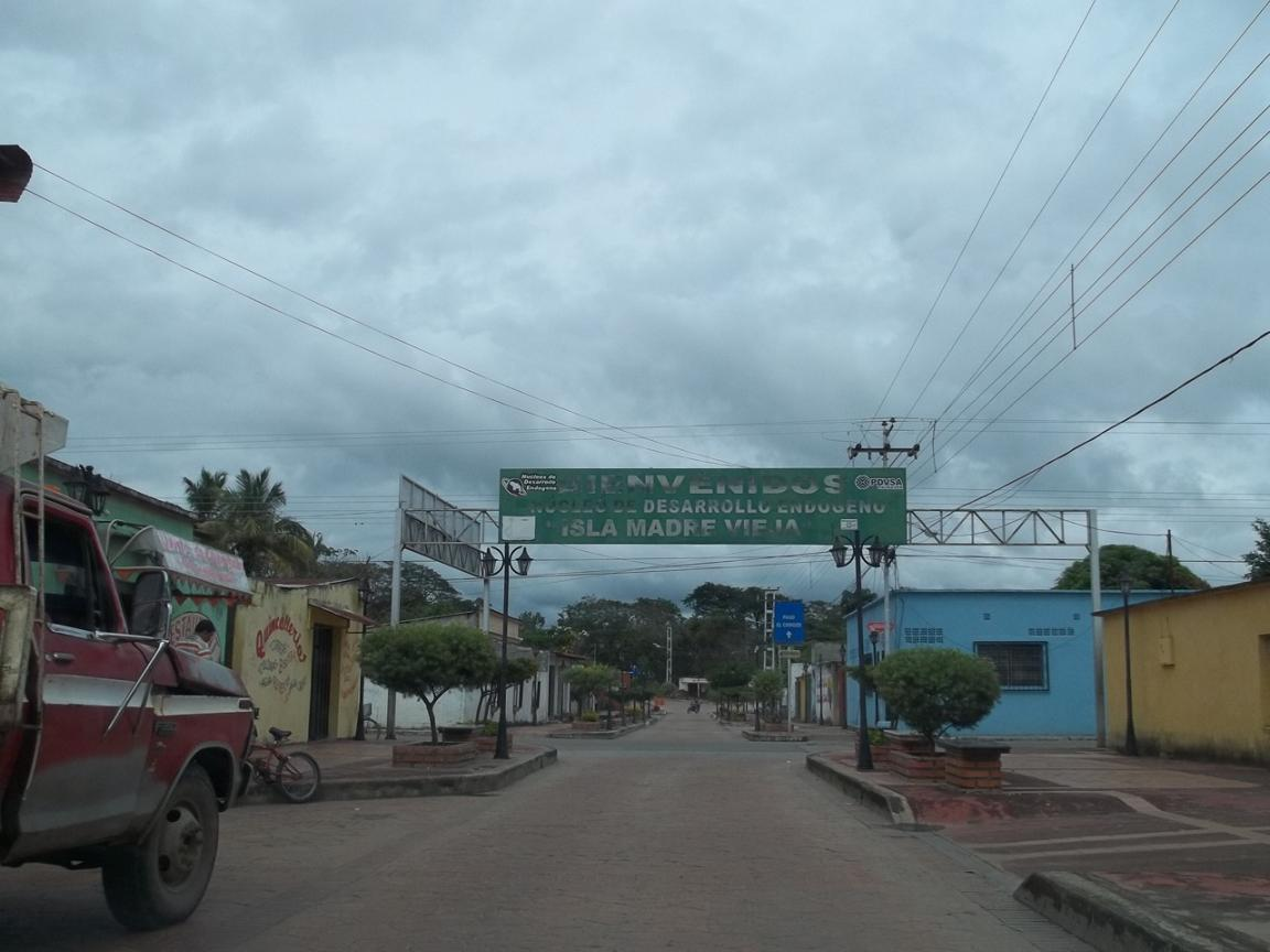 Calle de Sabaneta, Barinas, Venezuela.